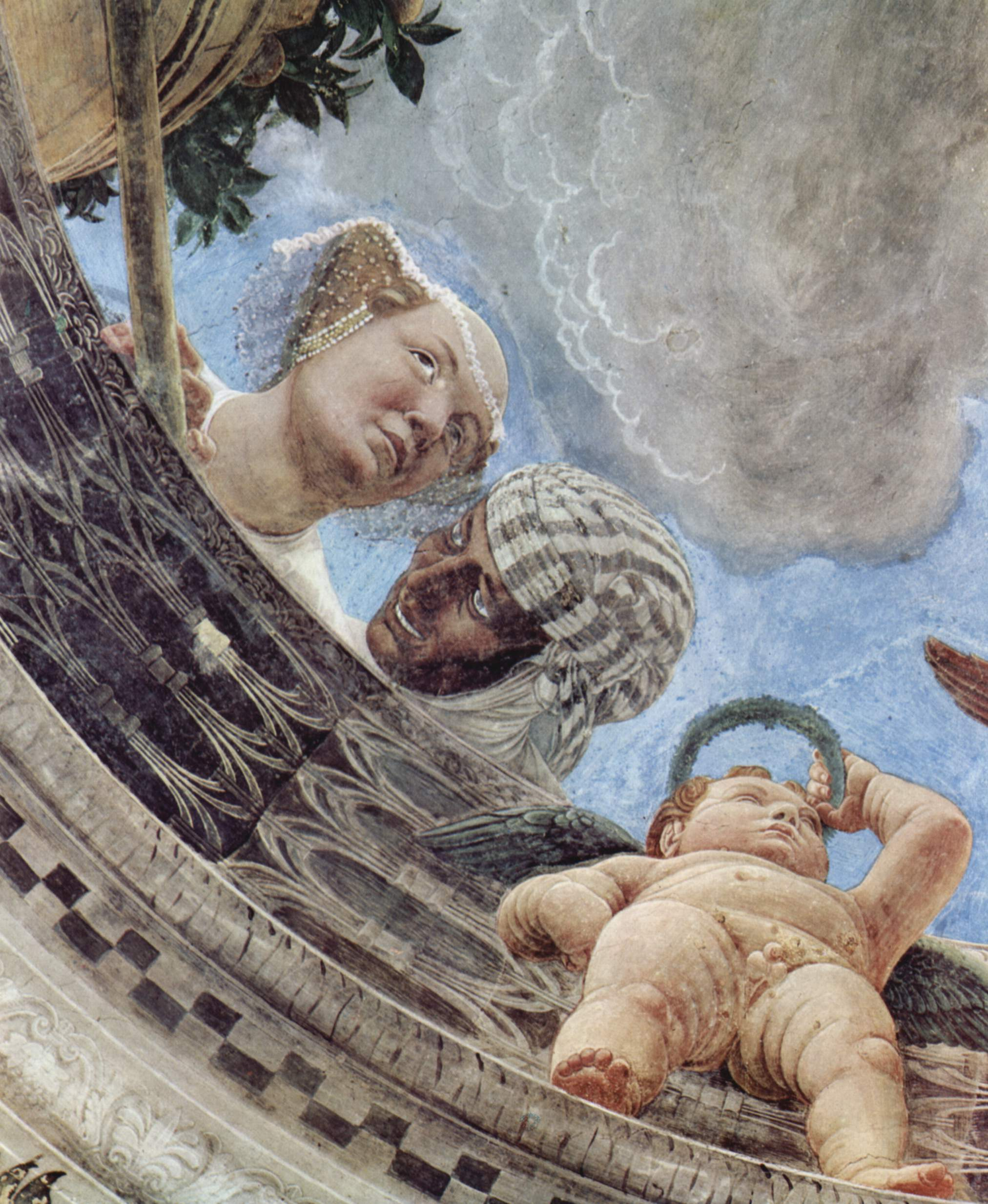 Gewölbefresko